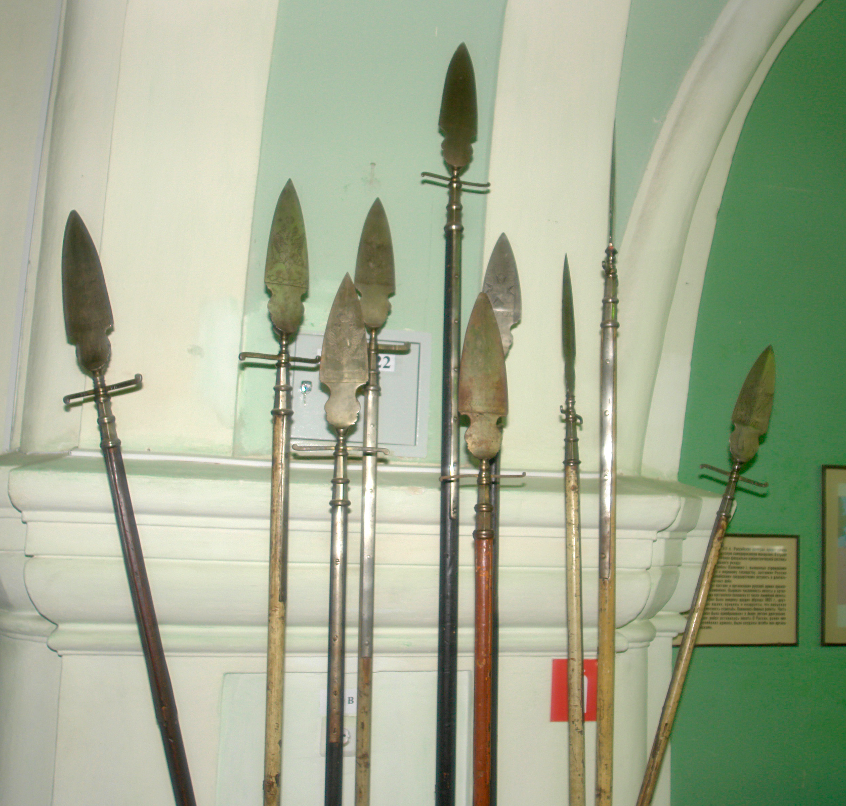 Эспонтоны пехотных офицеров. Конец XVIII - начало XIX века. Военно-исторический музей артиллерии, инженерных войск и войск связи.